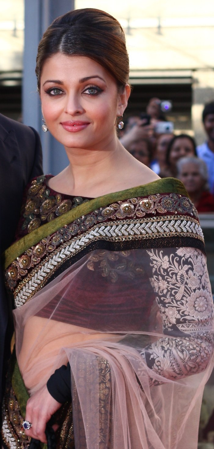 aishwarya bachchan